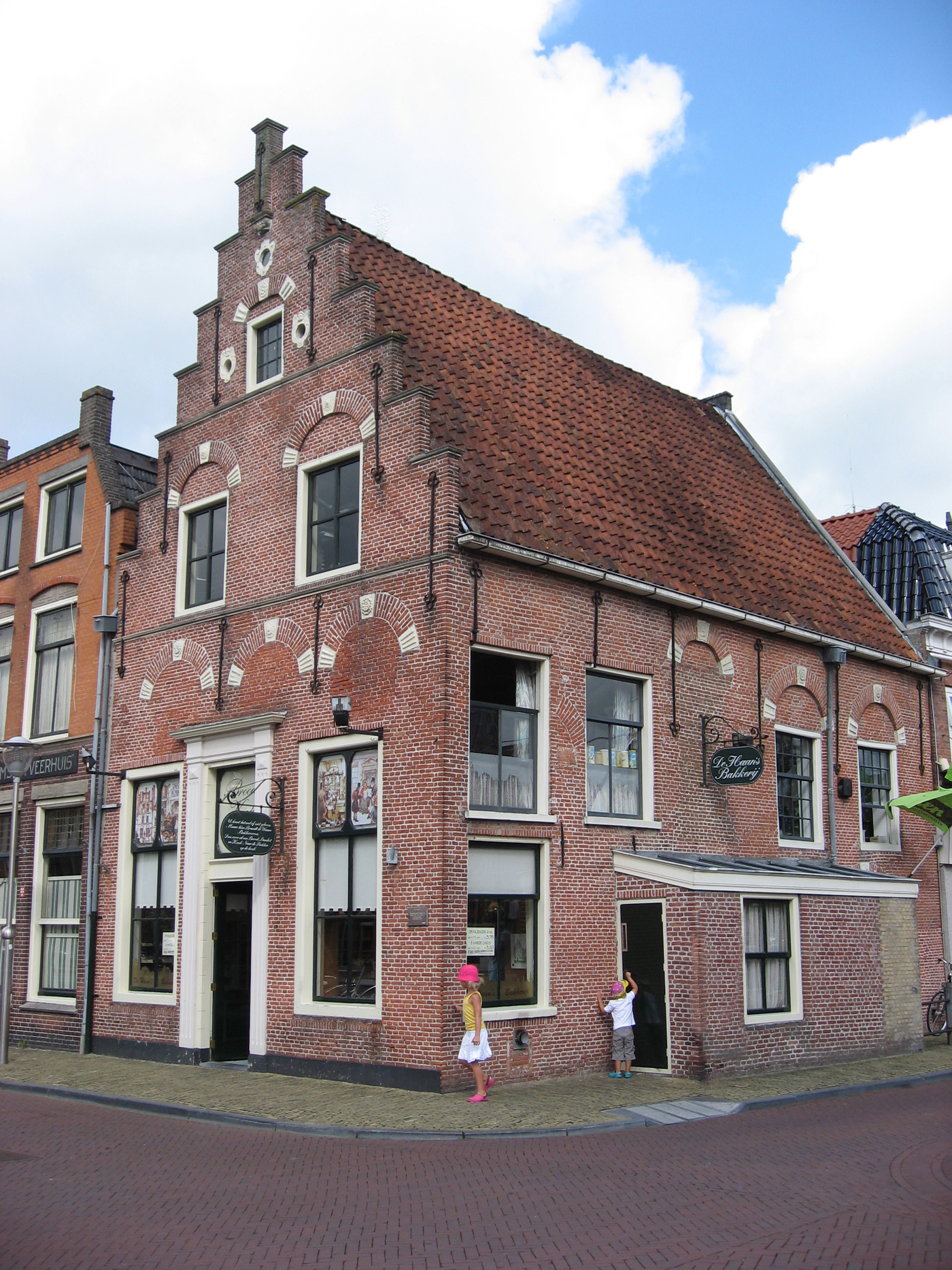 Bakery at Grootzand in Sneek, Friesland.